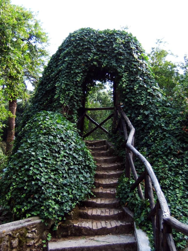 Villa Comunale di Cittanova (RC)